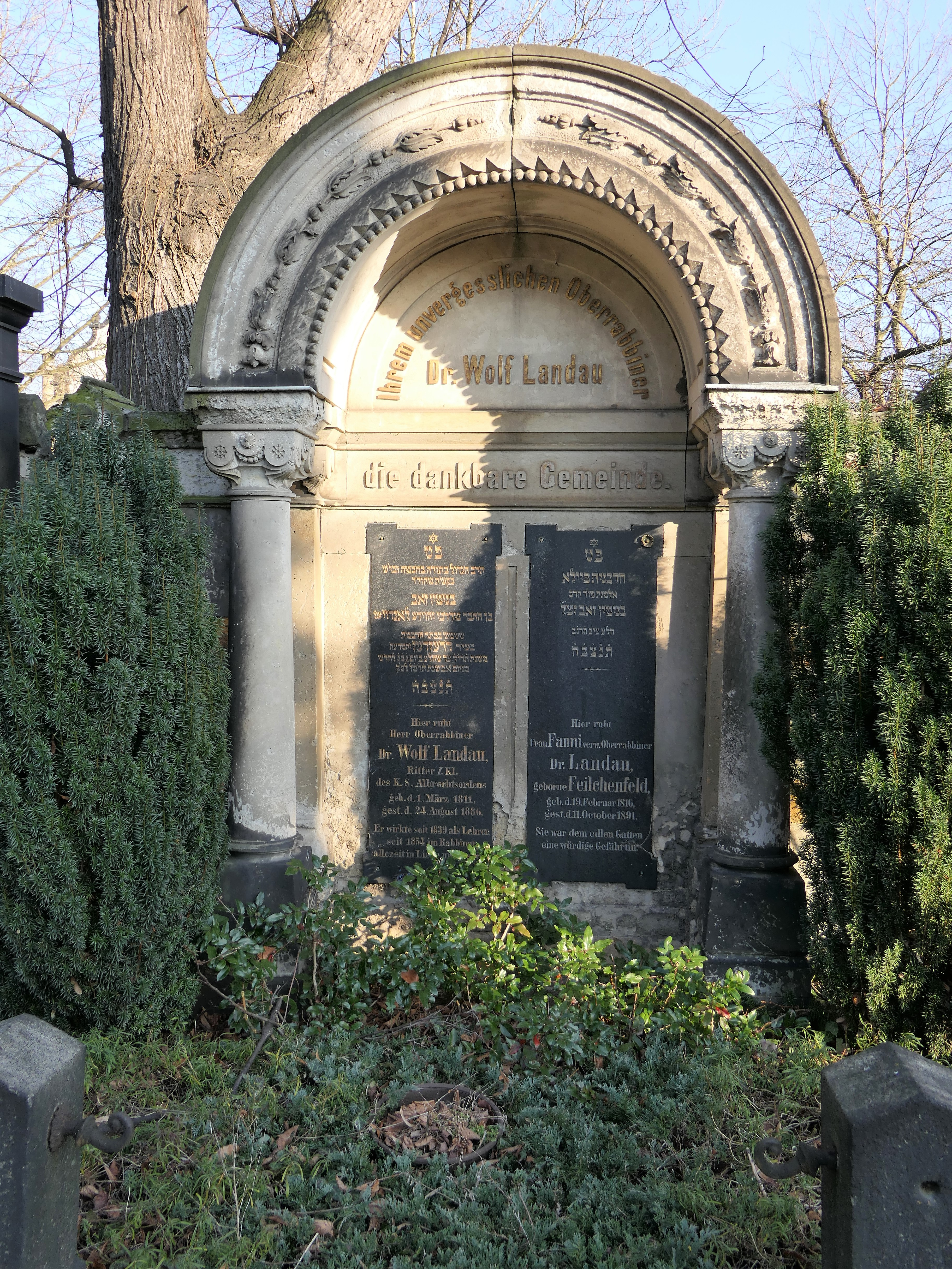 Grab von Dr. Wolf und Fanni Landau, Neuer Jüdischer Friedhof Dresden